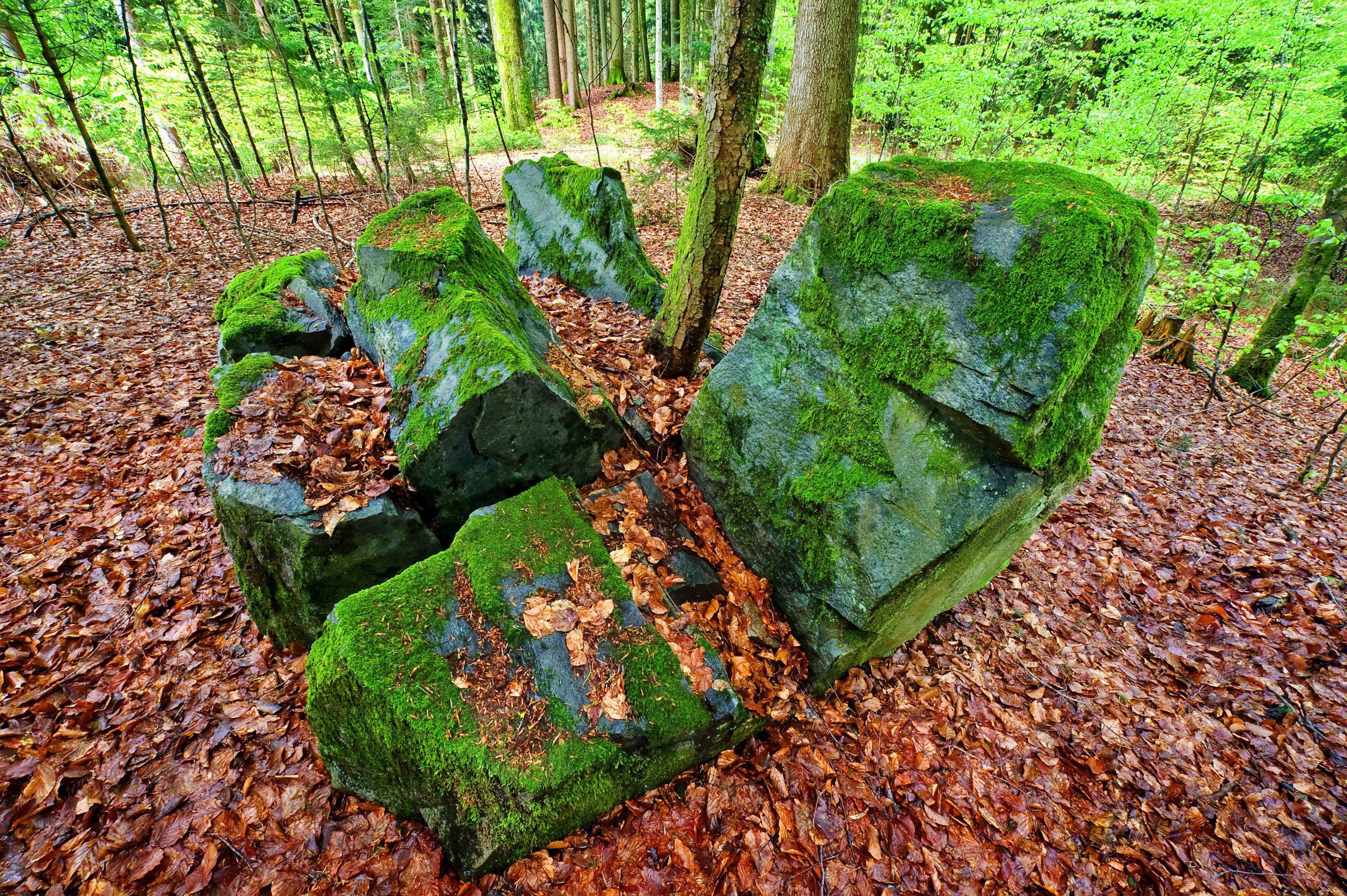 Erratischer Block am Schindelberg, Sachsenkam, Landkreis Bad Tölz WOR, Germany Geotopnummer 173R017